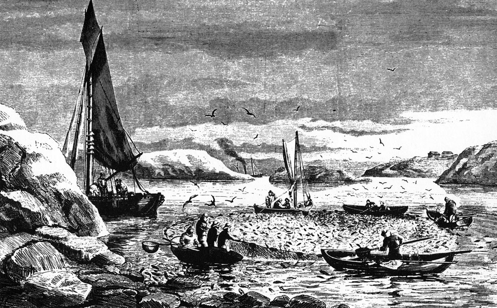 Fjällbacka. Sillfiske